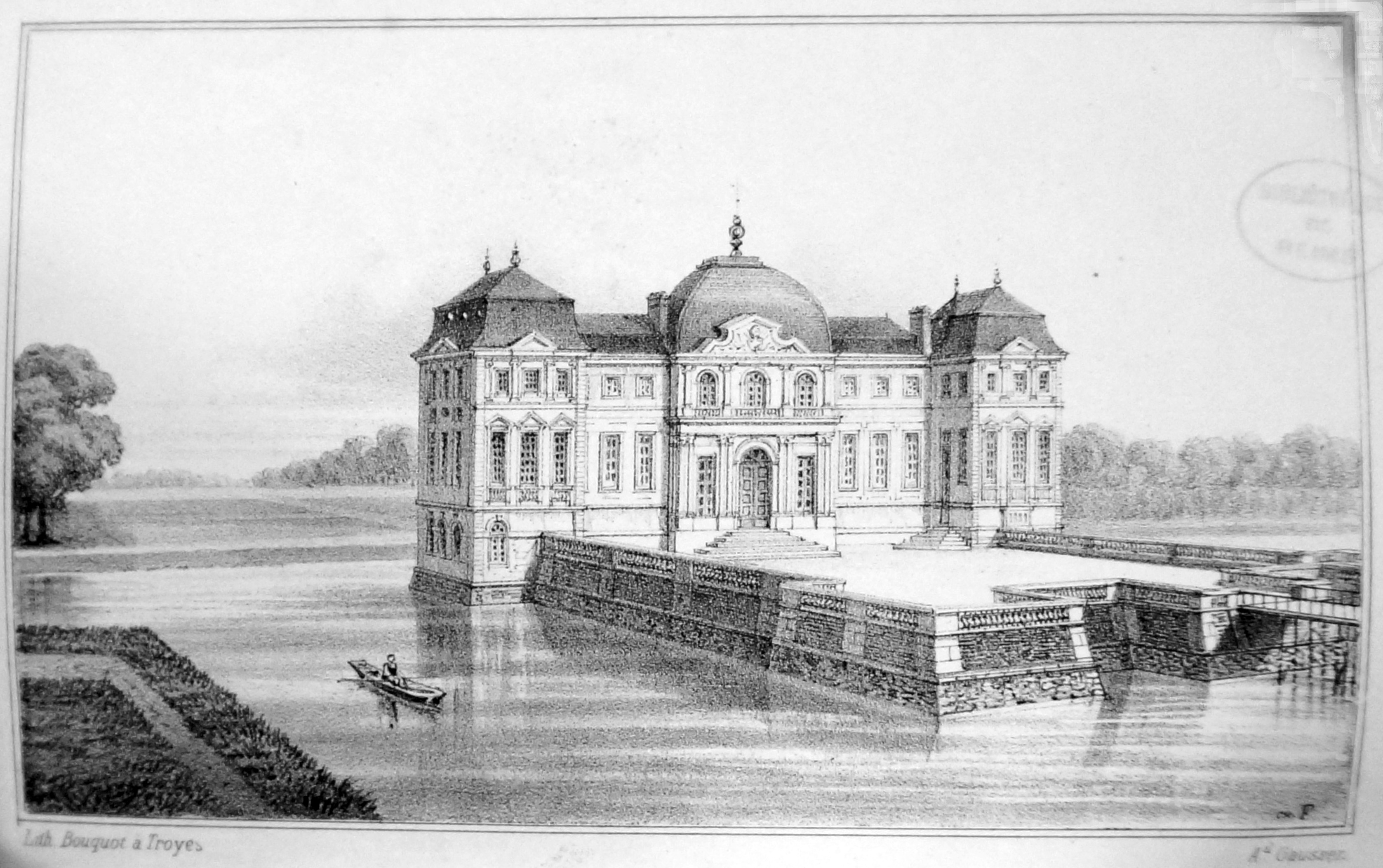 Chateau de Villacerf publié dans annuaire de l'aube en 1856.